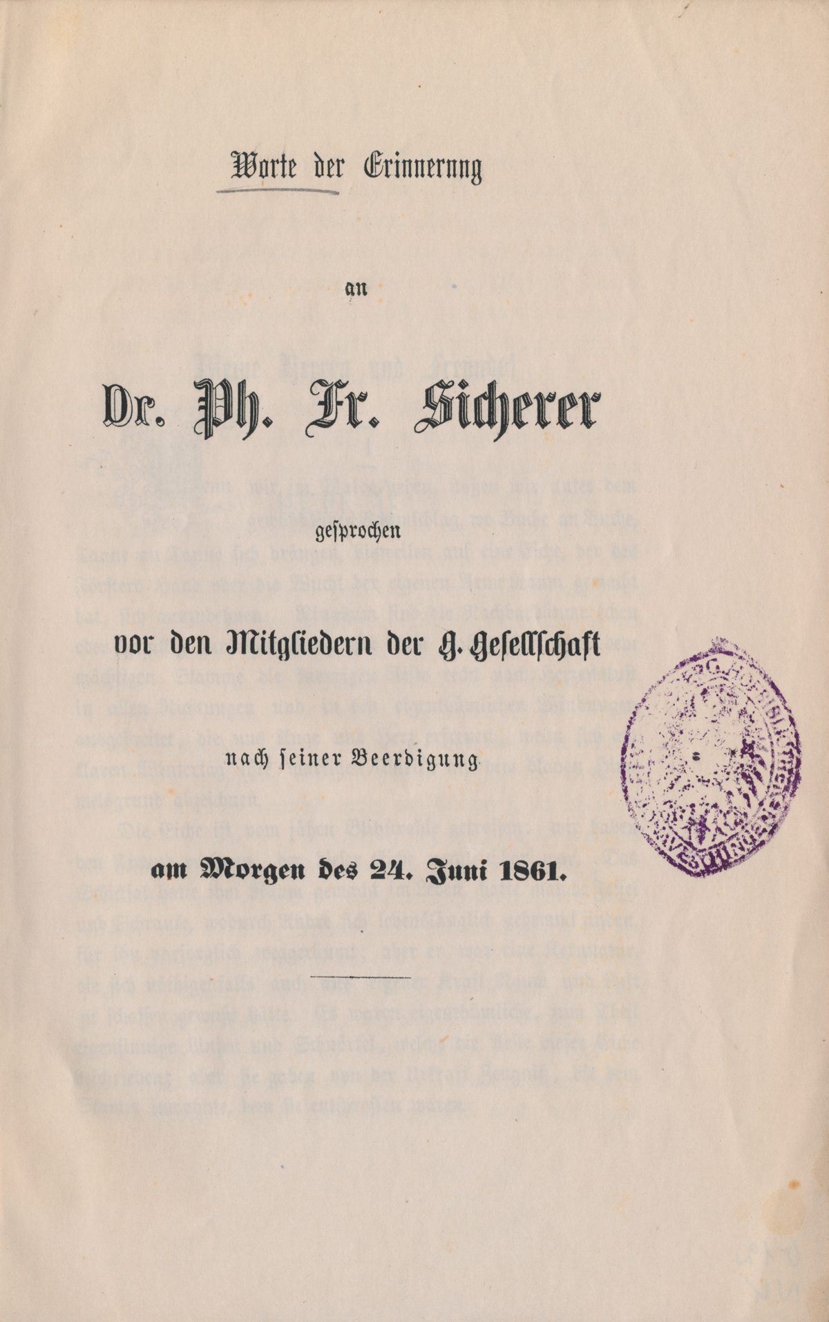 Titelblatt der „Worte der Erinnerung an Dr. Ph. Fr. Sicherer gesprochen vor den Mitgliedern der G[räßle]. Gesellschaft nach seiner Beerdigung am Morgen des 24. Juni 1861“, gedruckt bei der Schell'schen Buchdruckerei, Heilbronn 1861. Ehemaliges Büchereiexemplar mit Bibliotheksstempel der Fürstenbergschen Hofbibliothek Donaueschingen aus der Sammlung von Peter Schmelzle